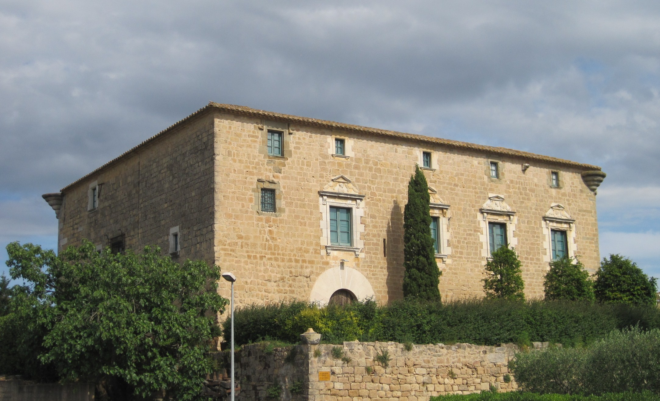 Façana principal,encarada a ponent, té un portal d'arc de mig punt, amb grans dovelles. S'obren al pis quatre finestrals amb decoració renaixentista, molt notables, són rectangulars i sobre les llindes hi ha les testes de quatre personatges en relleu.